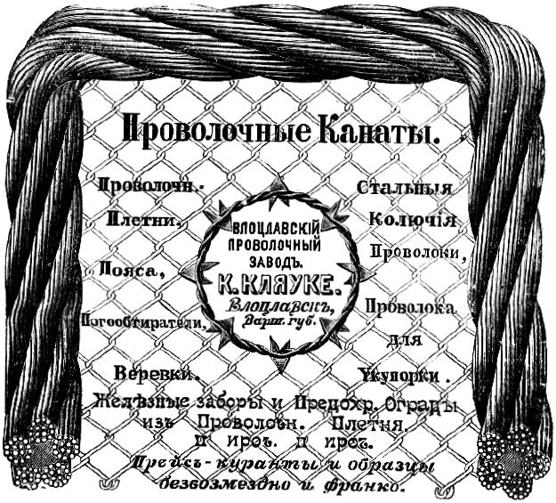 Проволочный канат - современный стальной трос.